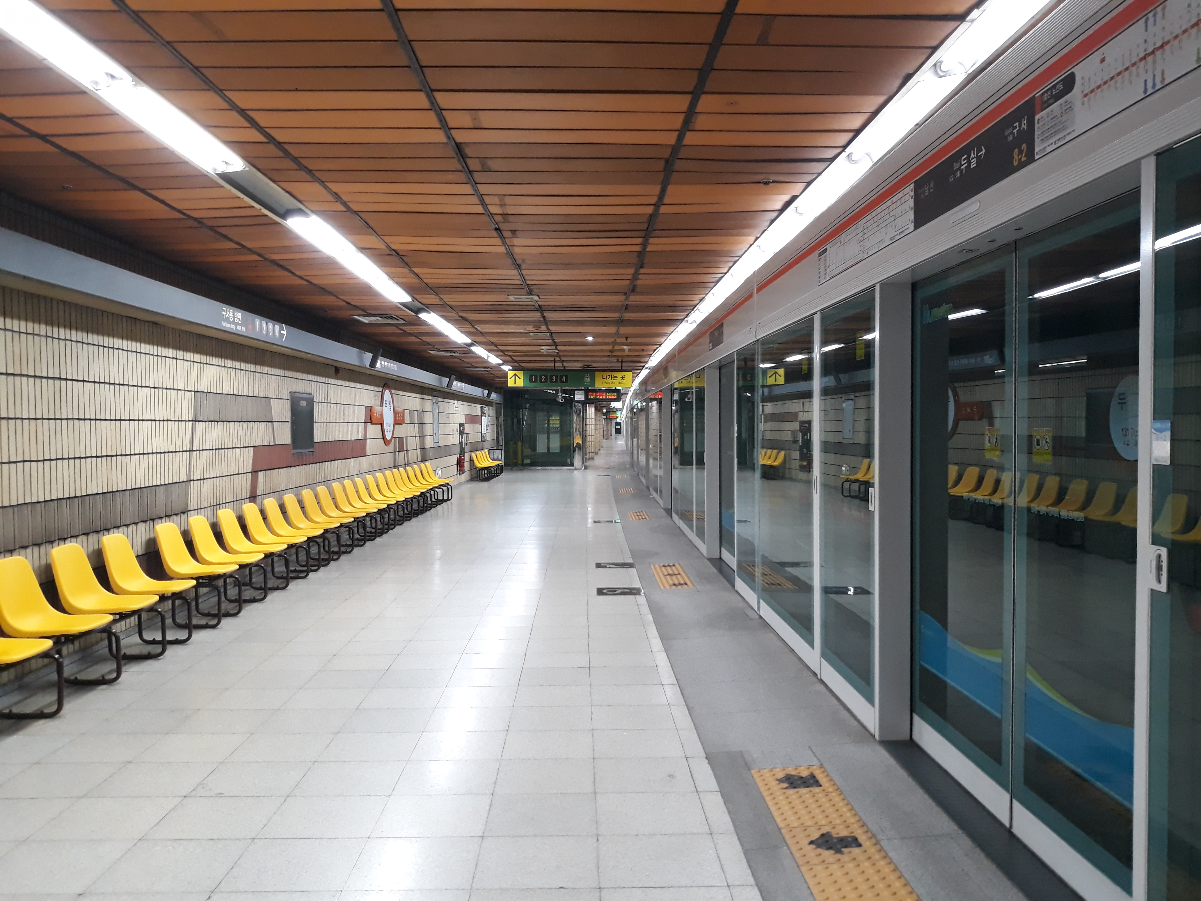 부산 도시철도 1호선 두실역 다대포해수욕장 방면 승강장